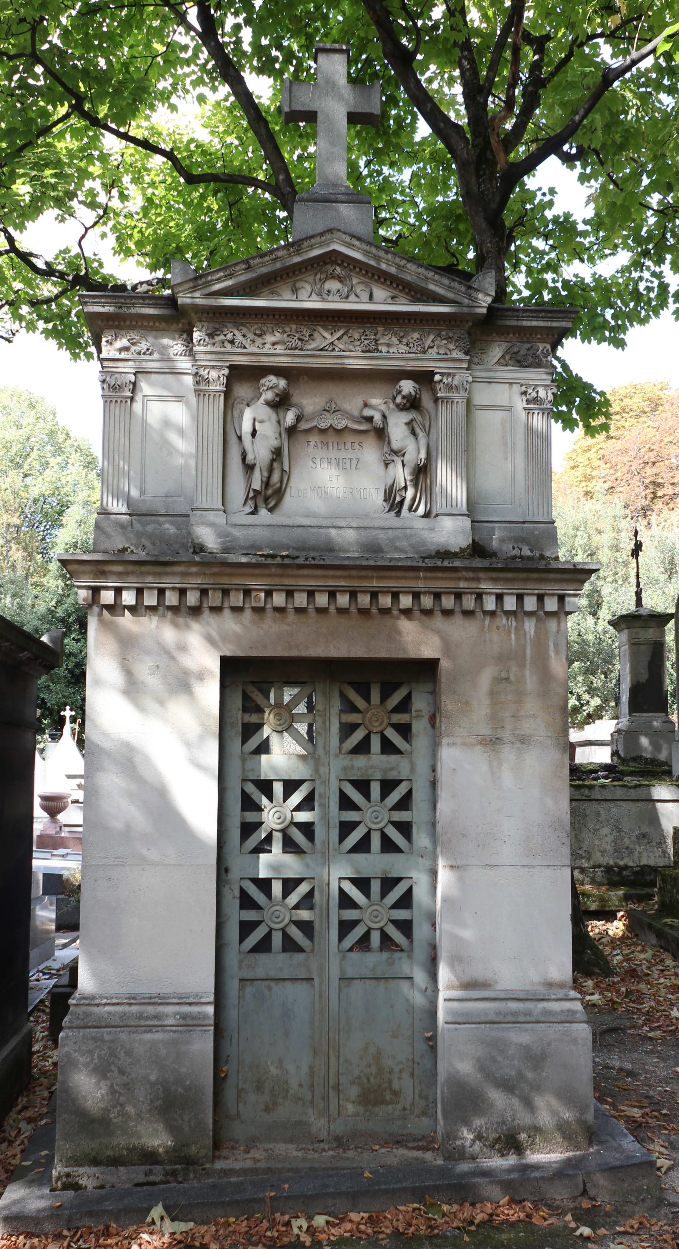 Chapelle